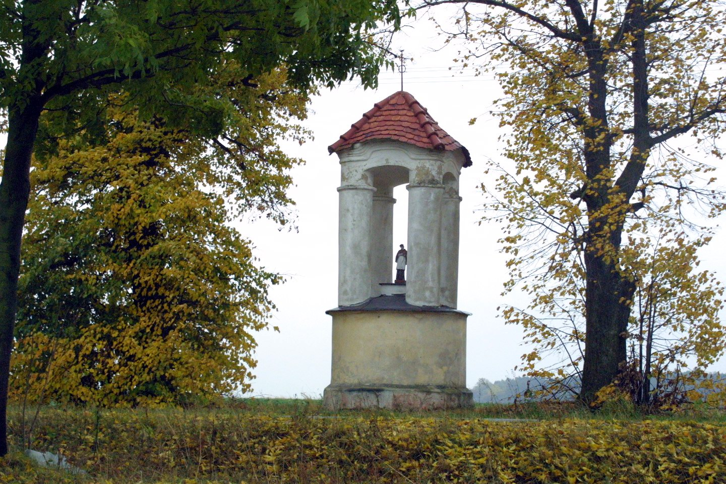 Jabłonna Lacka. Barokowa kapliczka przydrożna z drugiej poł. XVIII w.